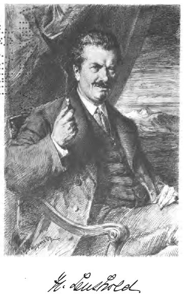 Heinrich Leuthold (1827-1879), schweizerischer Schriftsteller und Übersetzer